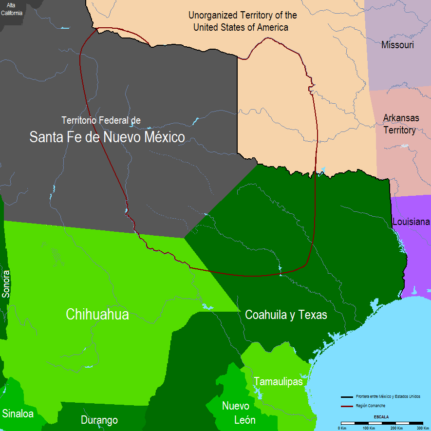 Mapa de Mexico en 1832 donde se muestra la Region Comanche